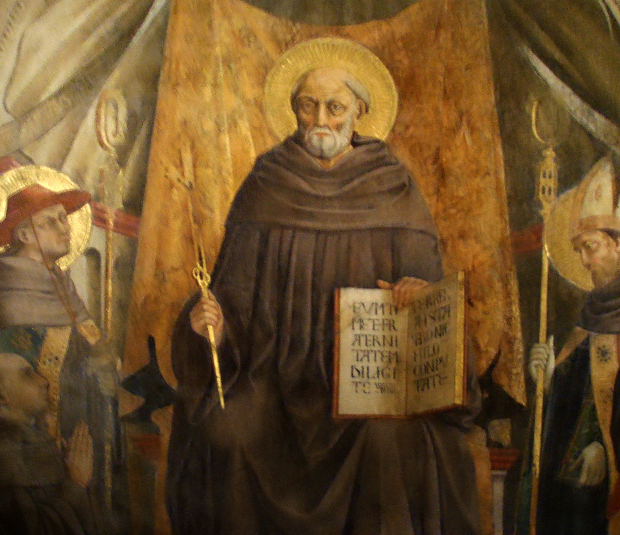 Santa Trinita, Neri_di_bicci, San Giovanni Gualberto and saints, inside, Florence, Italy